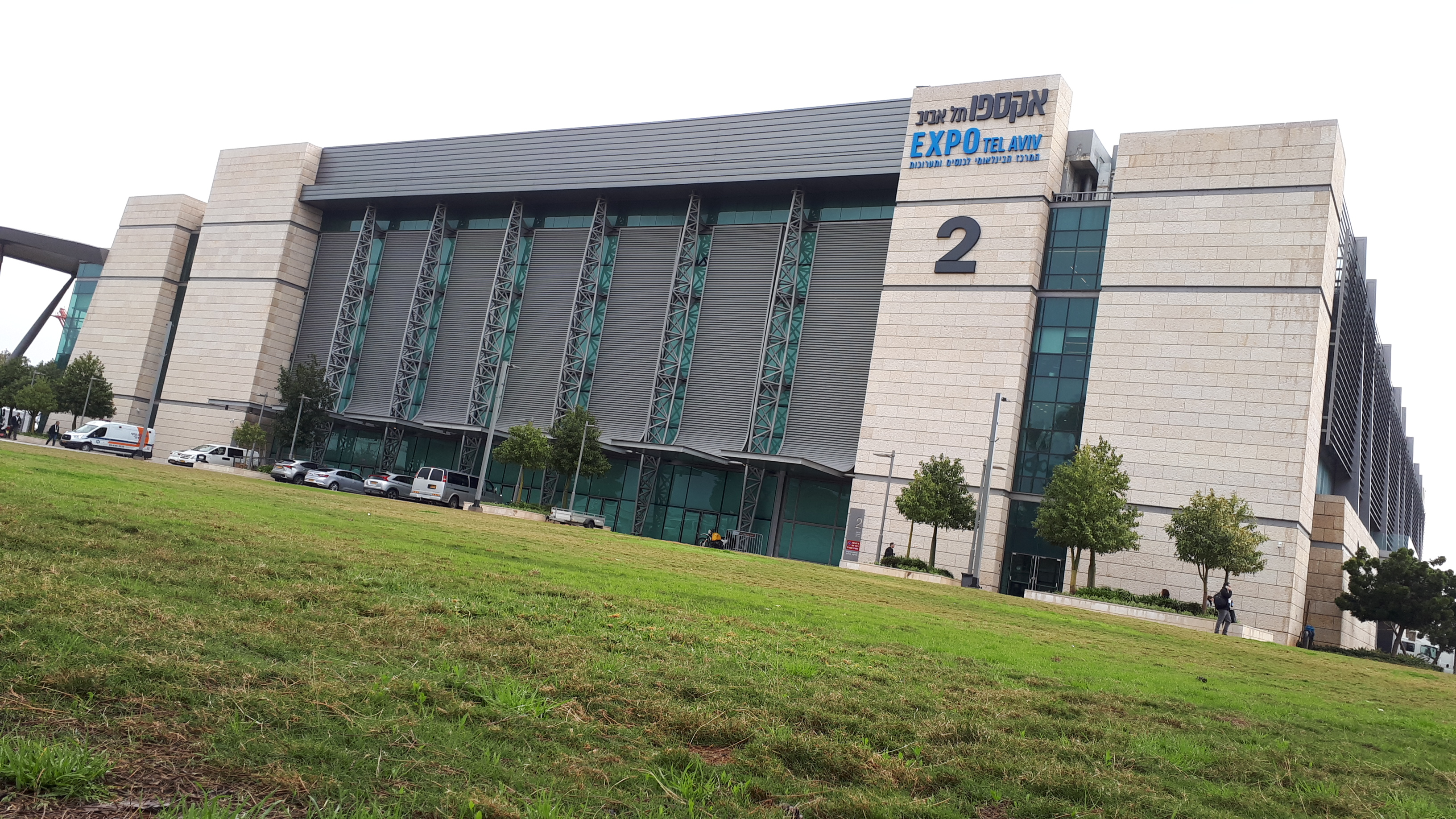 ביתן 2, גני התערוכה, תל אביב, פברואר 2019